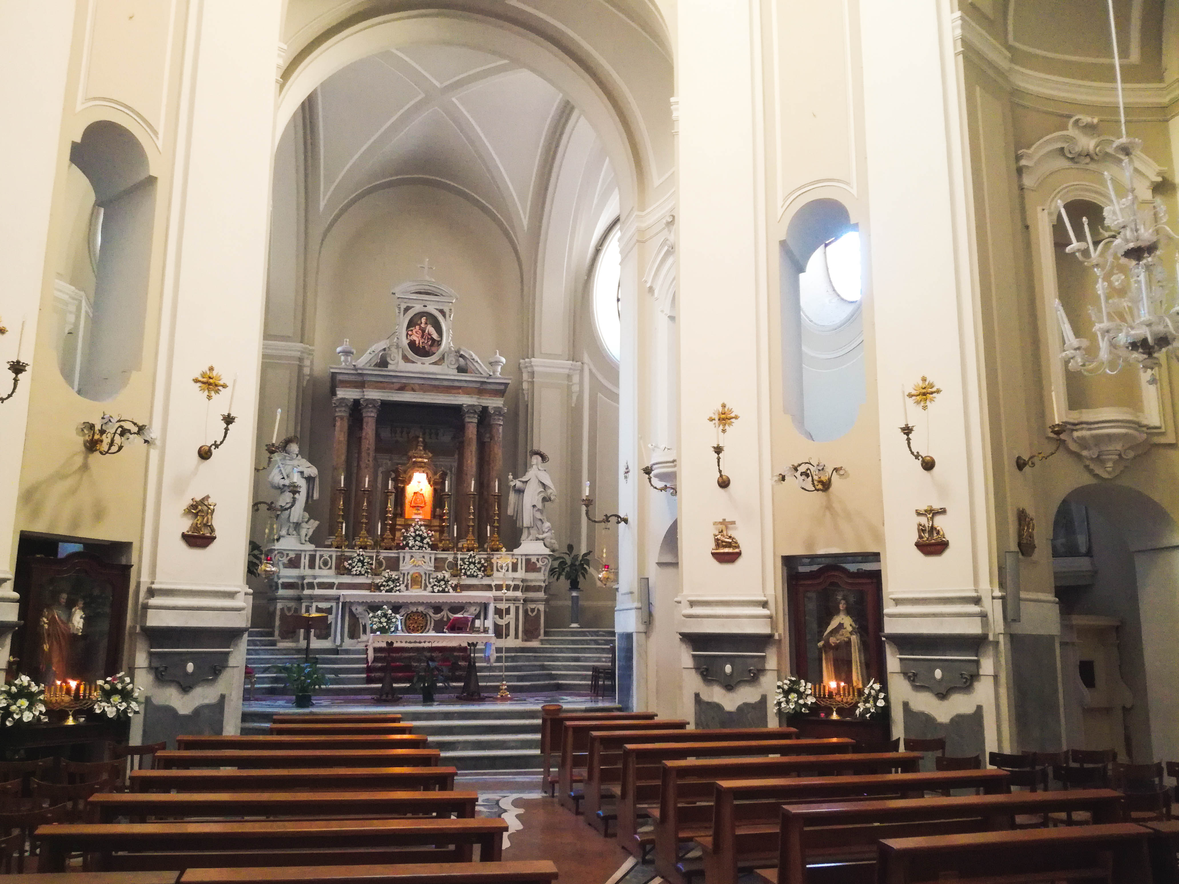 Interno della chiesa dei Santi Giovanni e Teresa (Napoli)